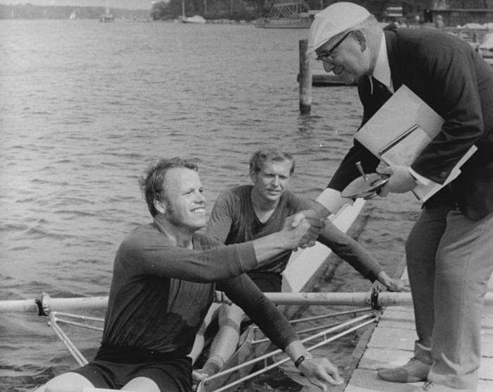 H.-U. Schmied, J. Bertow, H. Gast ADN-ZB Mittelstädt 16.5.76 Berlin: Grünauer Frühjahrs-Ruderregatta- Gratulation für die Sieger im Doppelzweier Hans-Ulrich Schmied (vorn)-Jürgen Bertow (Rgm. SC Berlin-Grünau-SC Dynamo Berlin) durch Herbert Gast, Mitglied des Präsidiums des DRSV der DDR.